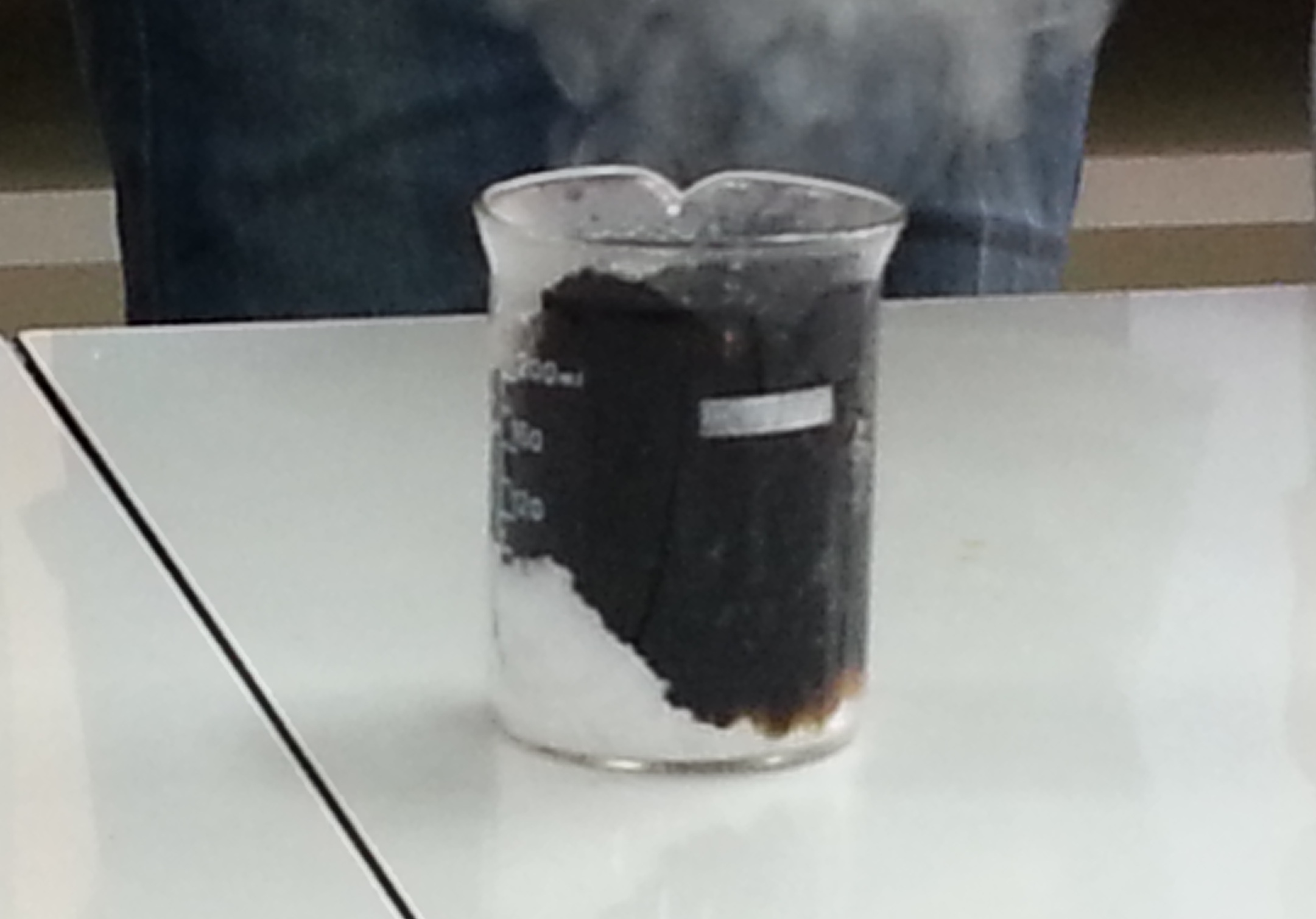 황산의 탈수 작용. 어떤 물질들에 황산(H2SO4)를 넣으면 저렇게 된다.